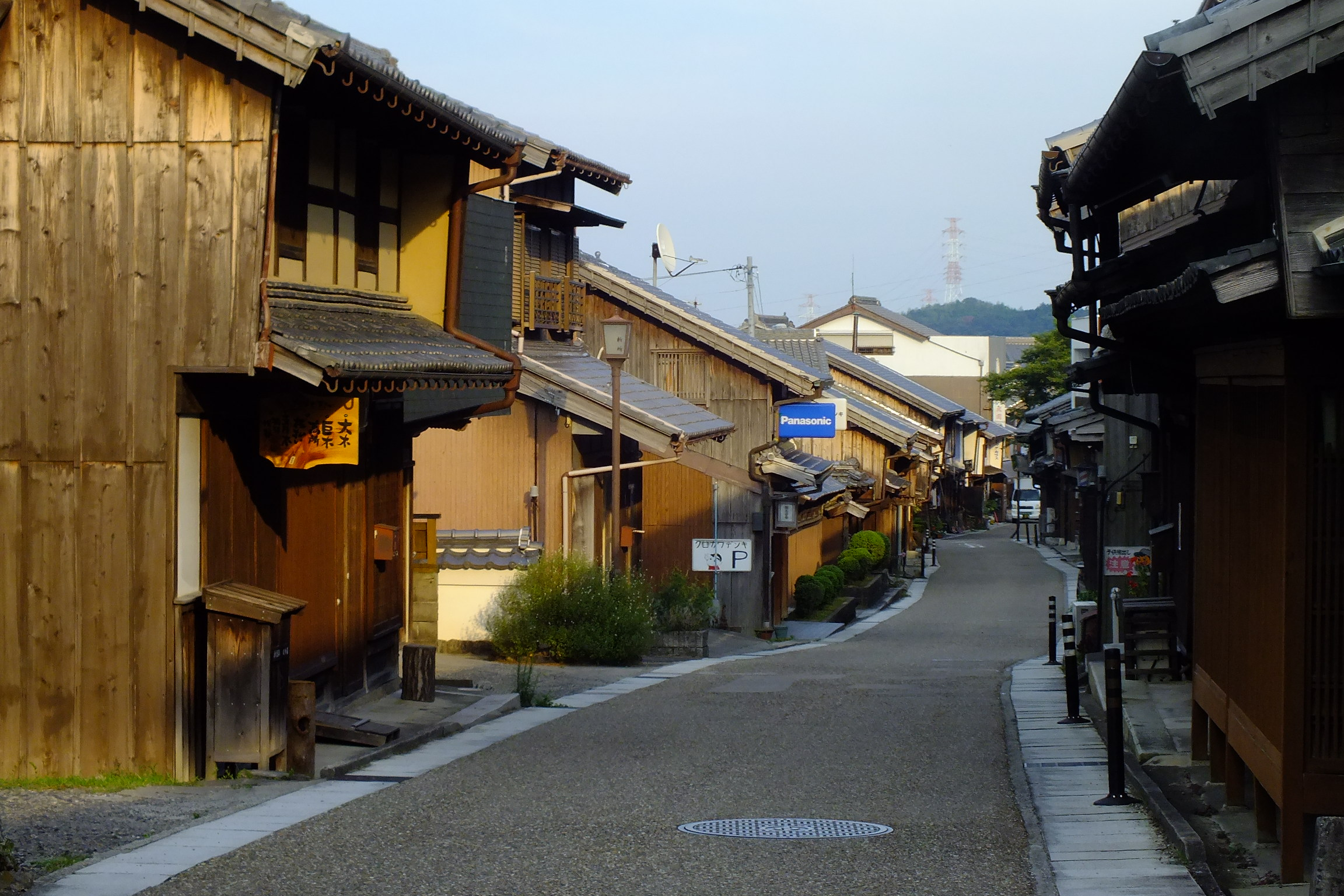 2016-08-05 Tokaido Seki Juku Kameyama City Mie,東海道五十三次 関宿